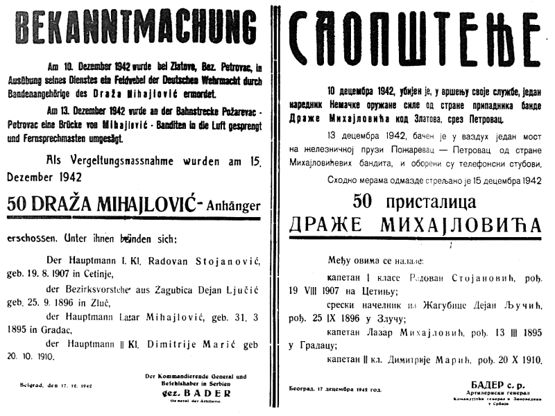 Srpski (latinica): Plakat o streljanju „50 DM pristalica“ zbog rušenja mosta na pruzi Požarevac - Petrovac na Mlavi iz decembra 1942.